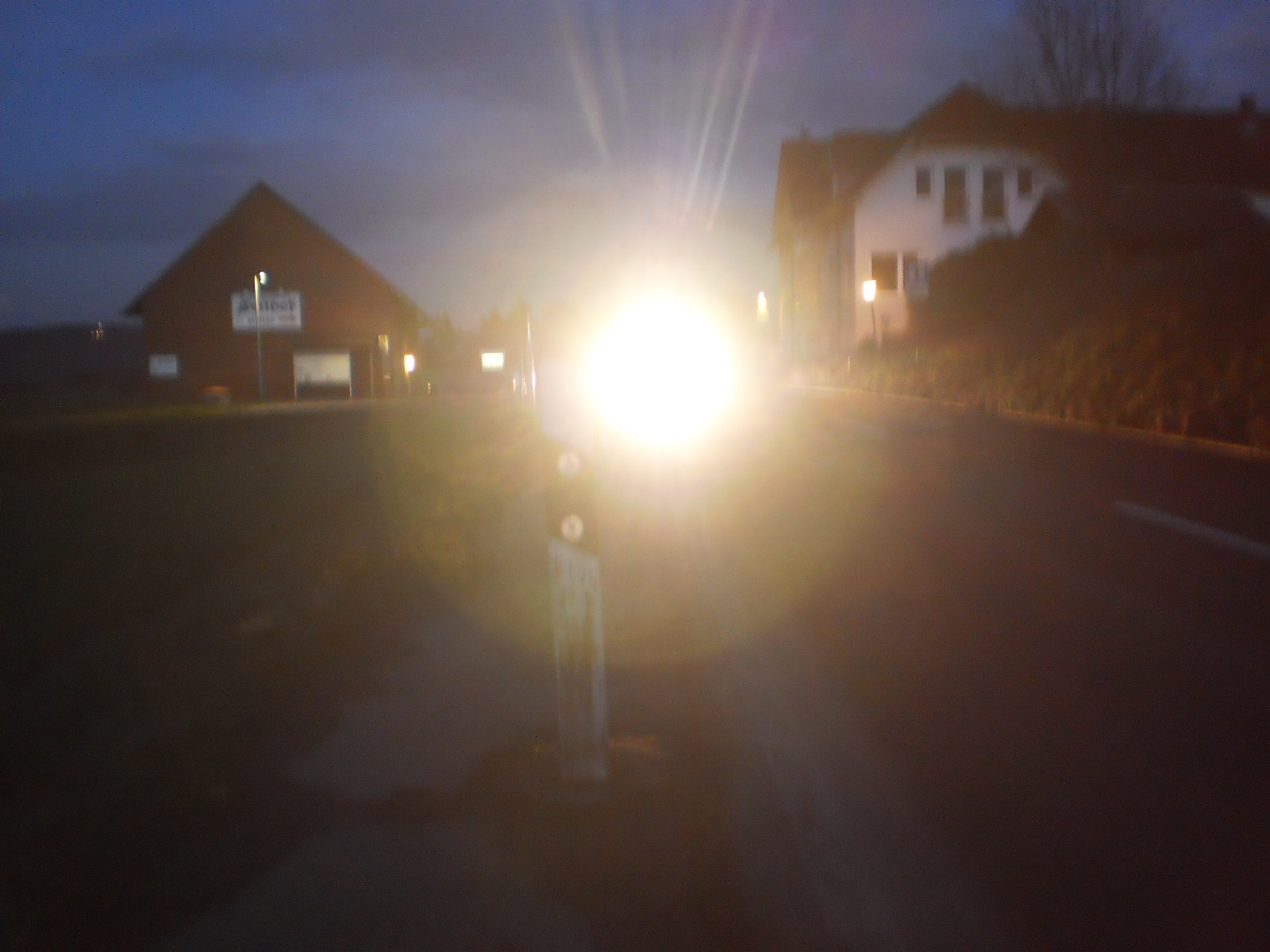 Blendende Scheinwerfer eines Autos auf der Kreisstrasse 72 (Oberer Rotenberg) in Marburg am Sellhof. Die Strasse überquert hier den Marburger Rücken, fast auf der Höhe der Wehrshauser Höhe (349 m). Ein Radweg existiert wie an vielen anderen Kreis- und Landstrassen nicht, wird aber im Jahr 2016 diskutiert, ebenso wie Verkehrsberuhigung der schnell befahrbaren Abschnitte der Strasse. Weitere Verkehrsverbindungen von der Kernstadt Marburg in die Elnhausen-Michelbacher Senke sind die K 68 im Süden und die L 3092 im Norden.